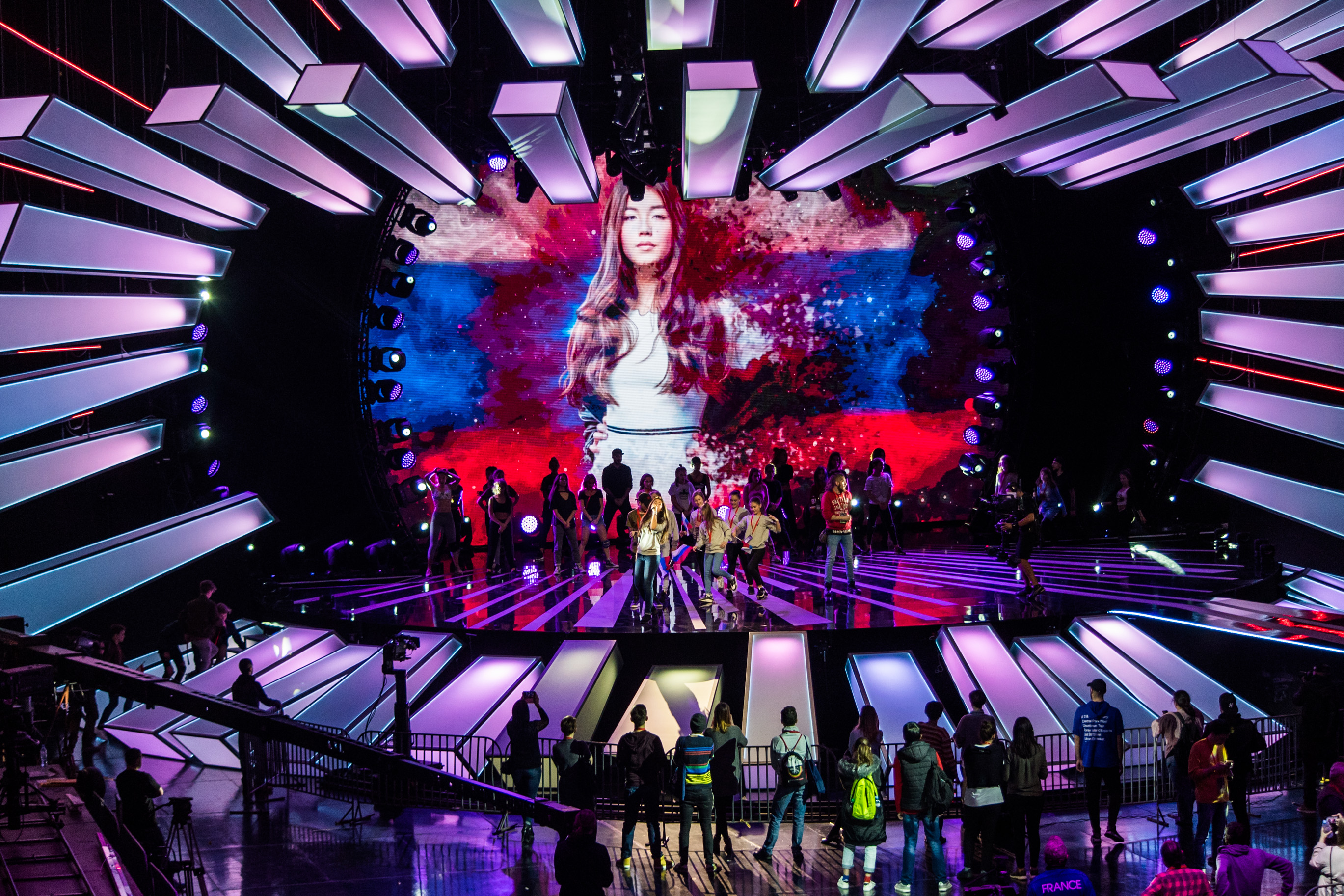 Репетиция церемонии открытия Детского Евровидения 2017